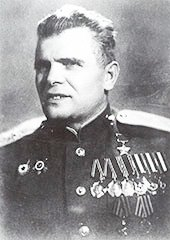 Михаил Васильевич Водопьянов (1899—1980) — советский лётчик